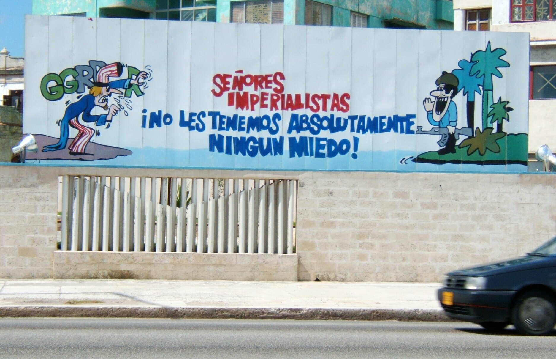 Плакат возле бывшего посольства США в Гаване